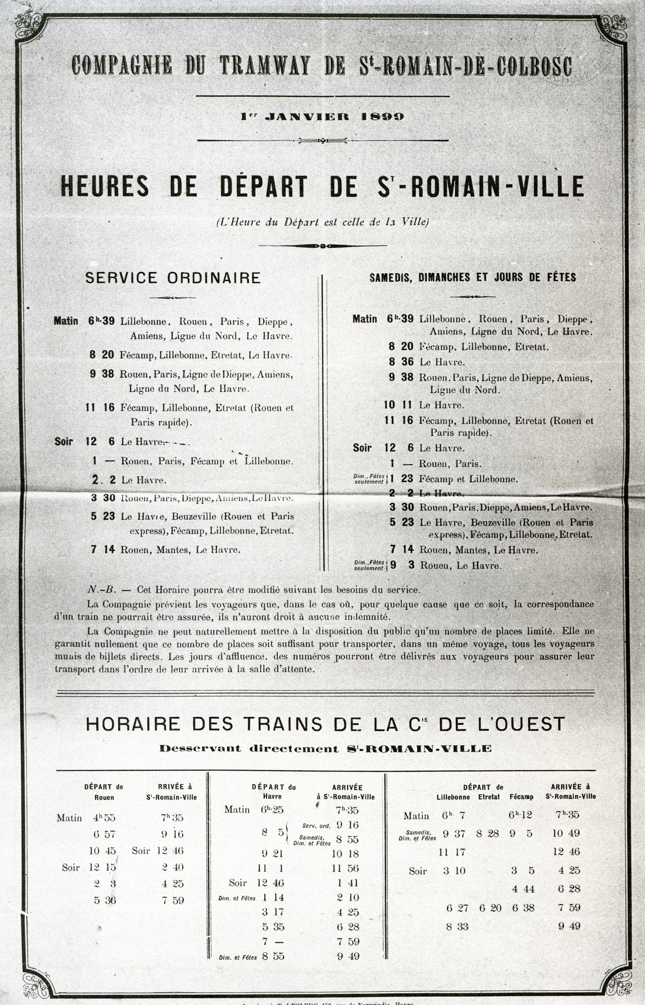 Horaires du tramway de Saint-Romain-de-Colbosc